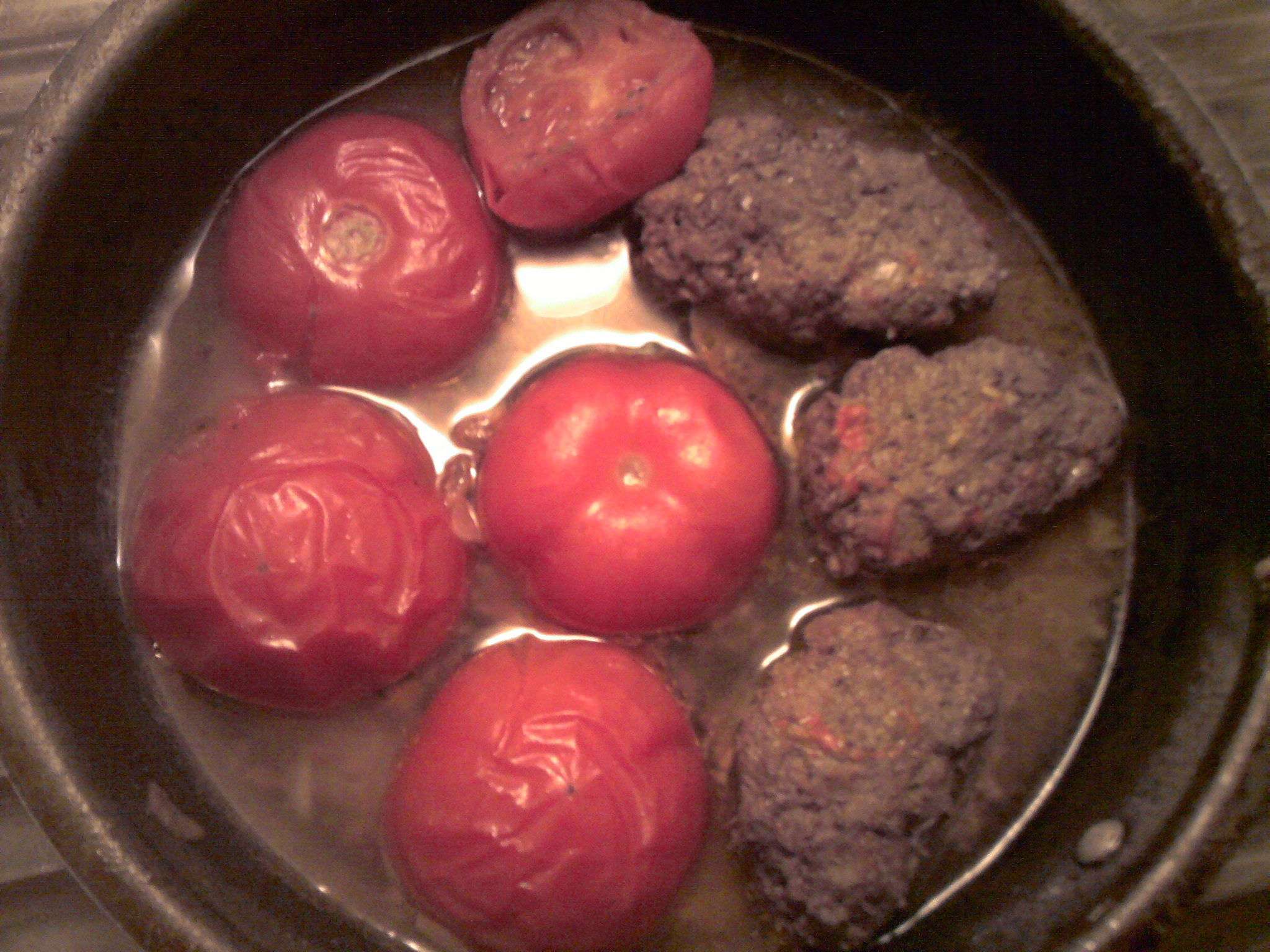 کباب تابه‌ای که در آب پخته شده‌است.